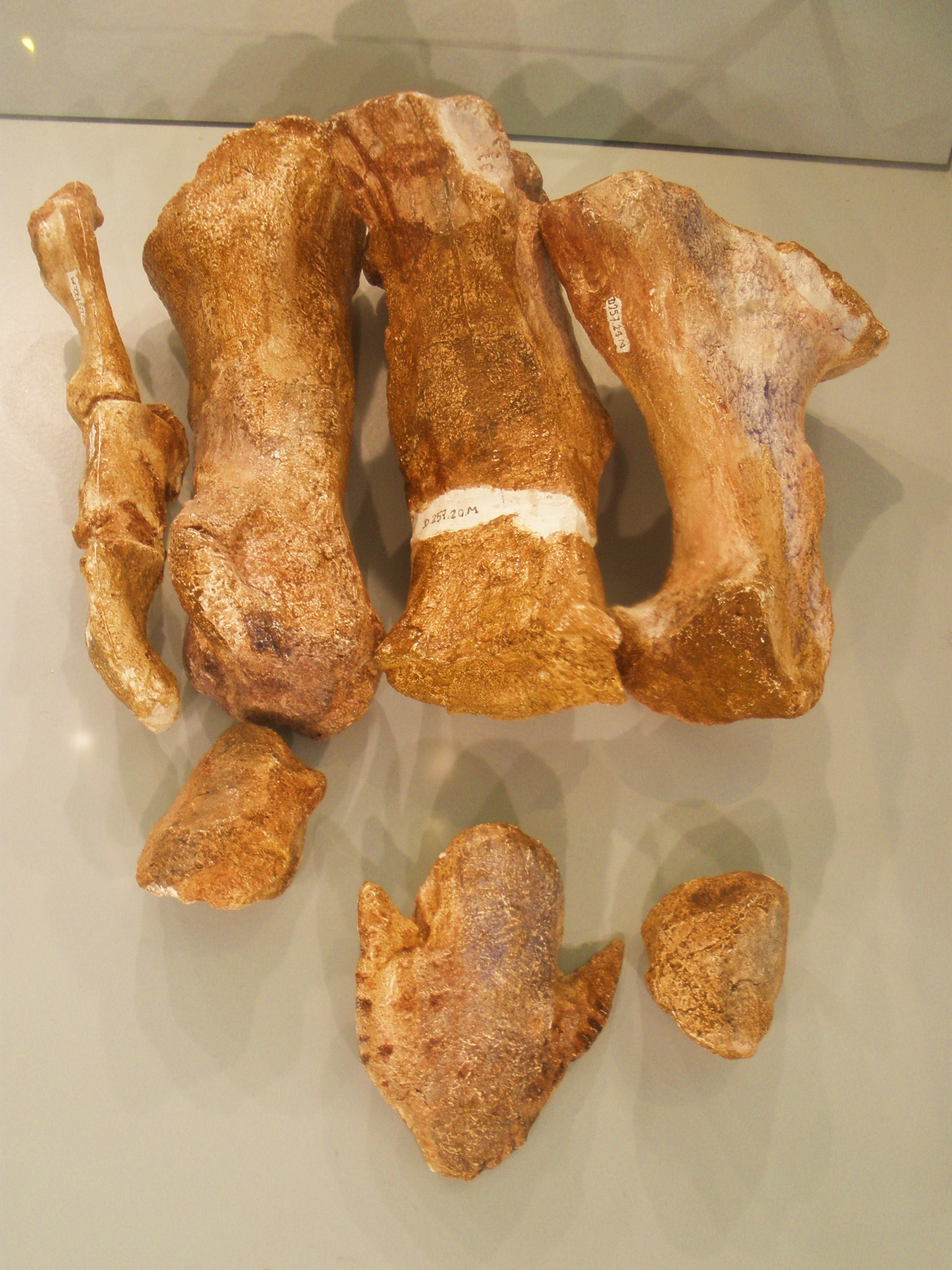 Fossil of Rhabdodon, an ornithopod dinosaur Took the photo at Musee d'Histoire Naturelle, Brussels